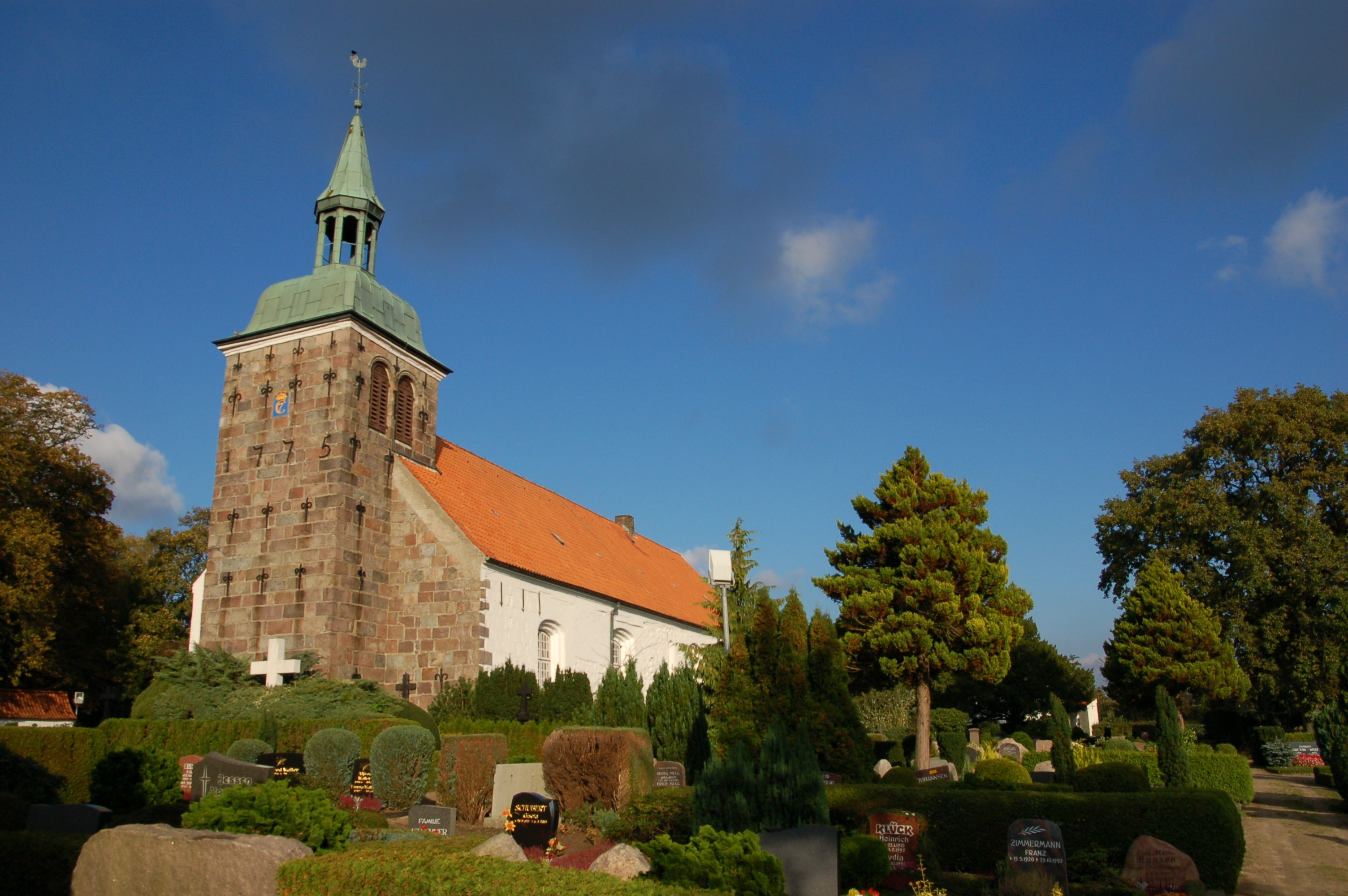 St. Johannis church, or Adelbyer church in Flensburg-Tarup, Germany